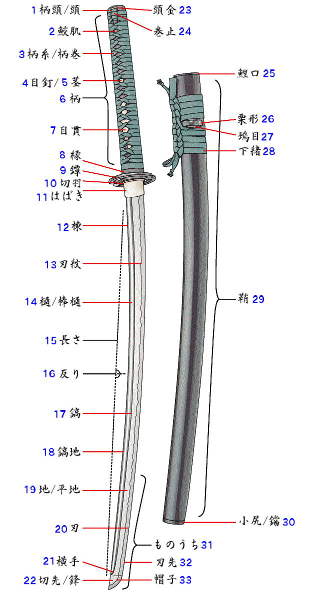 日本刀の各部名称